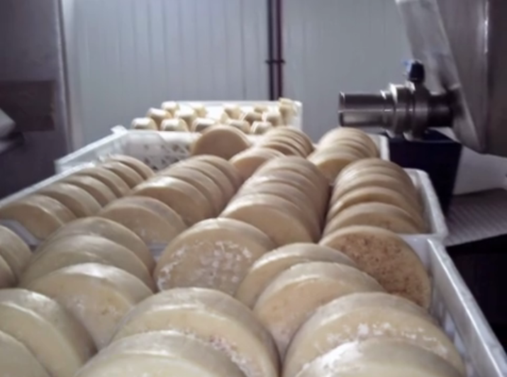 Quesería Castilcerro en Castilblanco